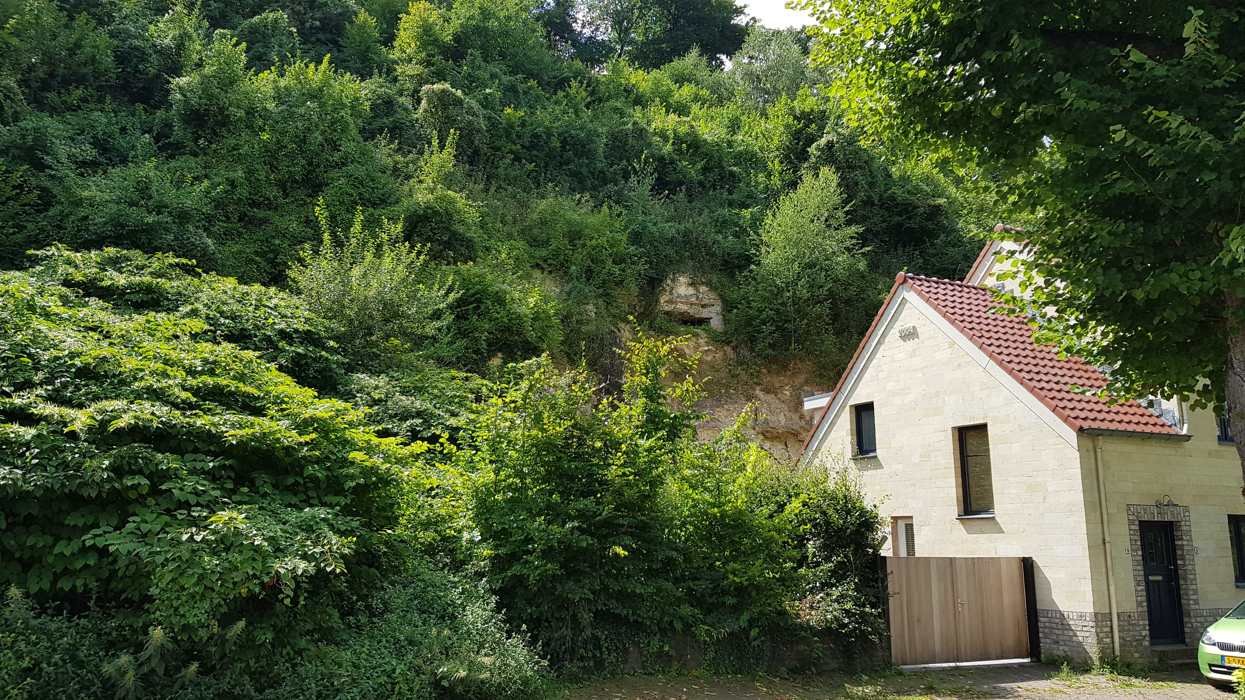 Amorgroeve, Geulhem, Nederland